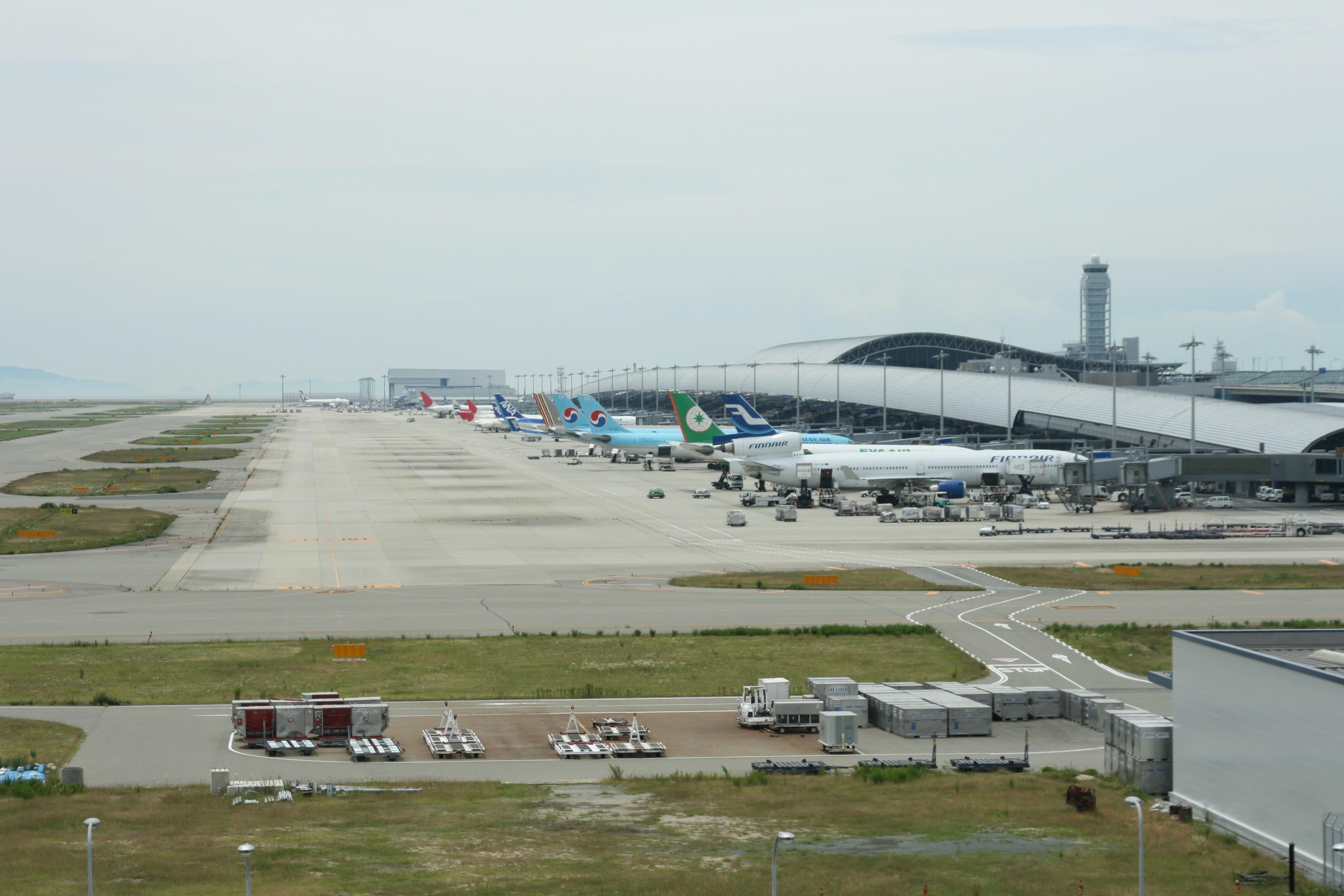 Kansai Airport